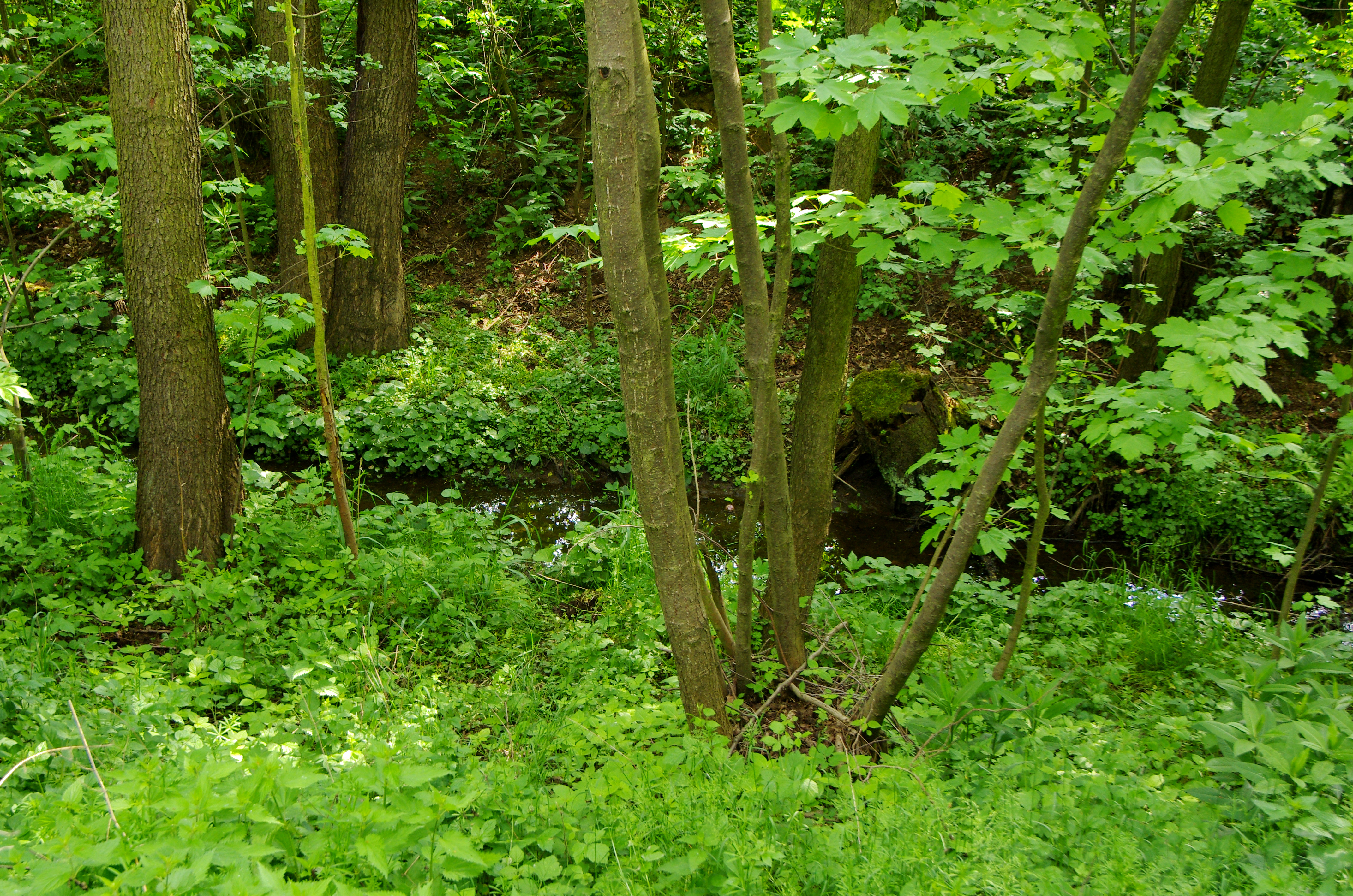 Radvanovský potok u Radvanova, okres Sokolov